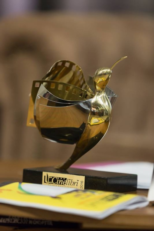 Статуетката "Синелибри" символизира взаимодействието между литературата и киното